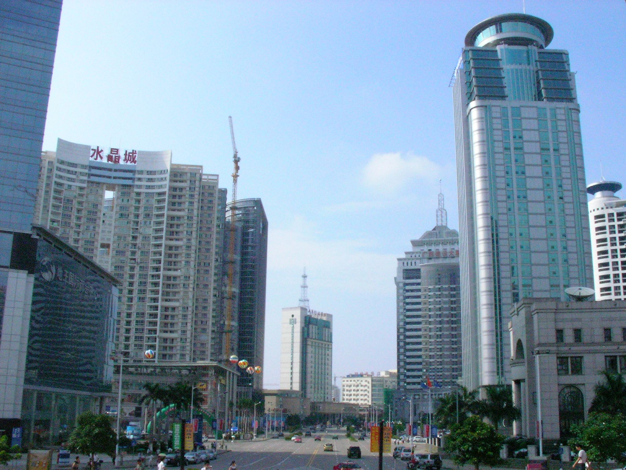 a street in nanning.